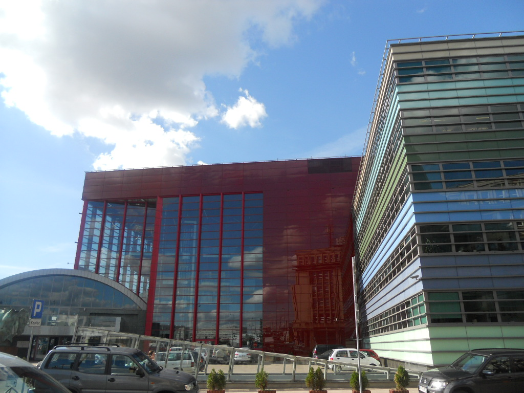 Opera Krakowska przy ulicy Lubicz 48.